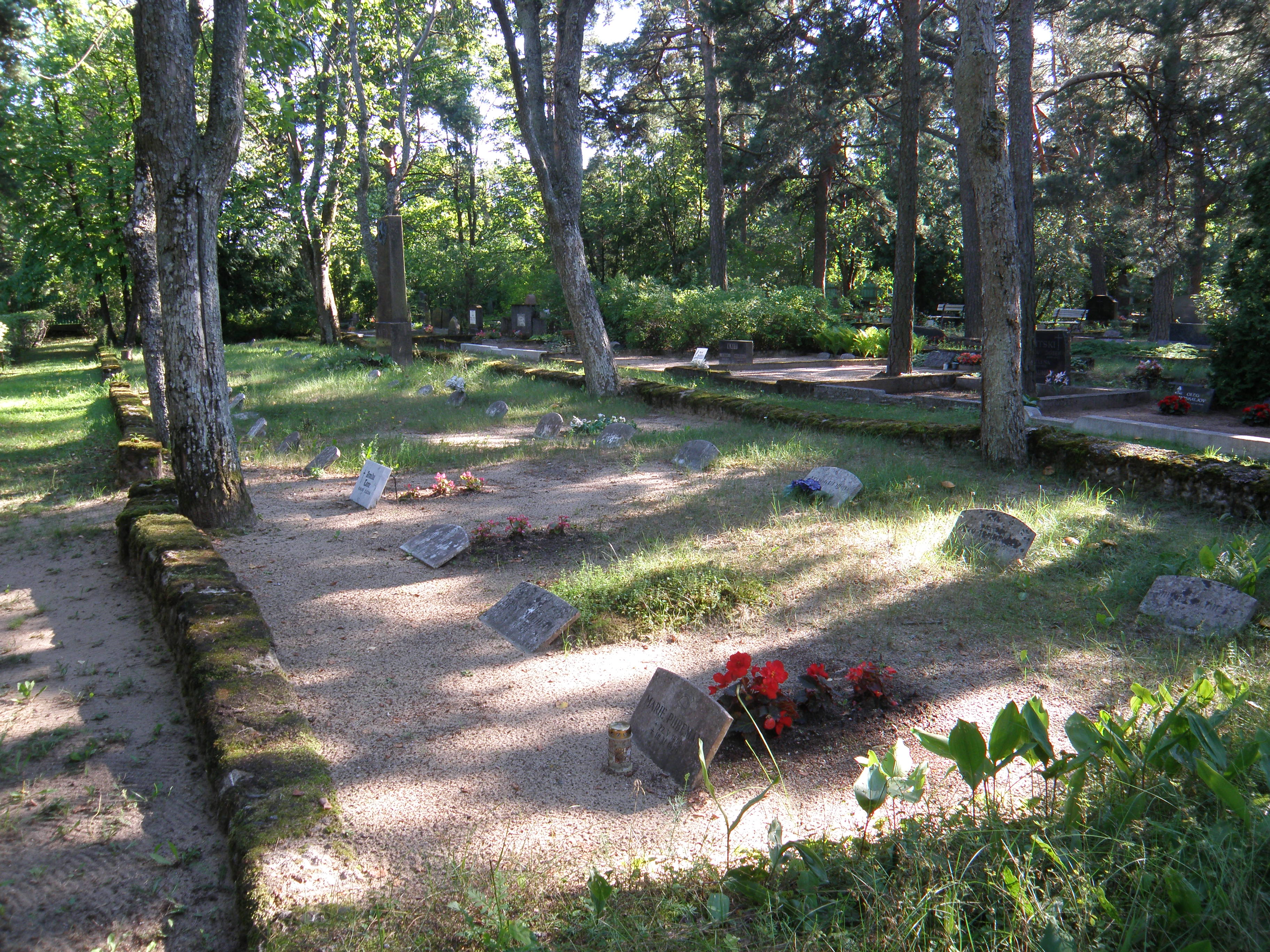 Hiiu-Rahu kalmistu